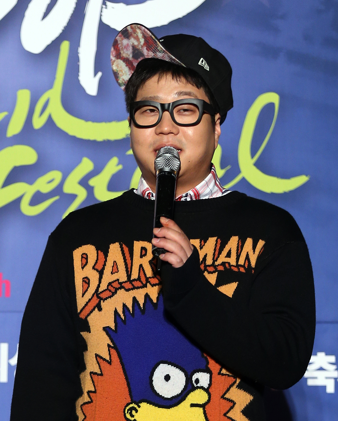 제3회 K-POP 월드 페스티벌에 참석한 신사동 호랭이.